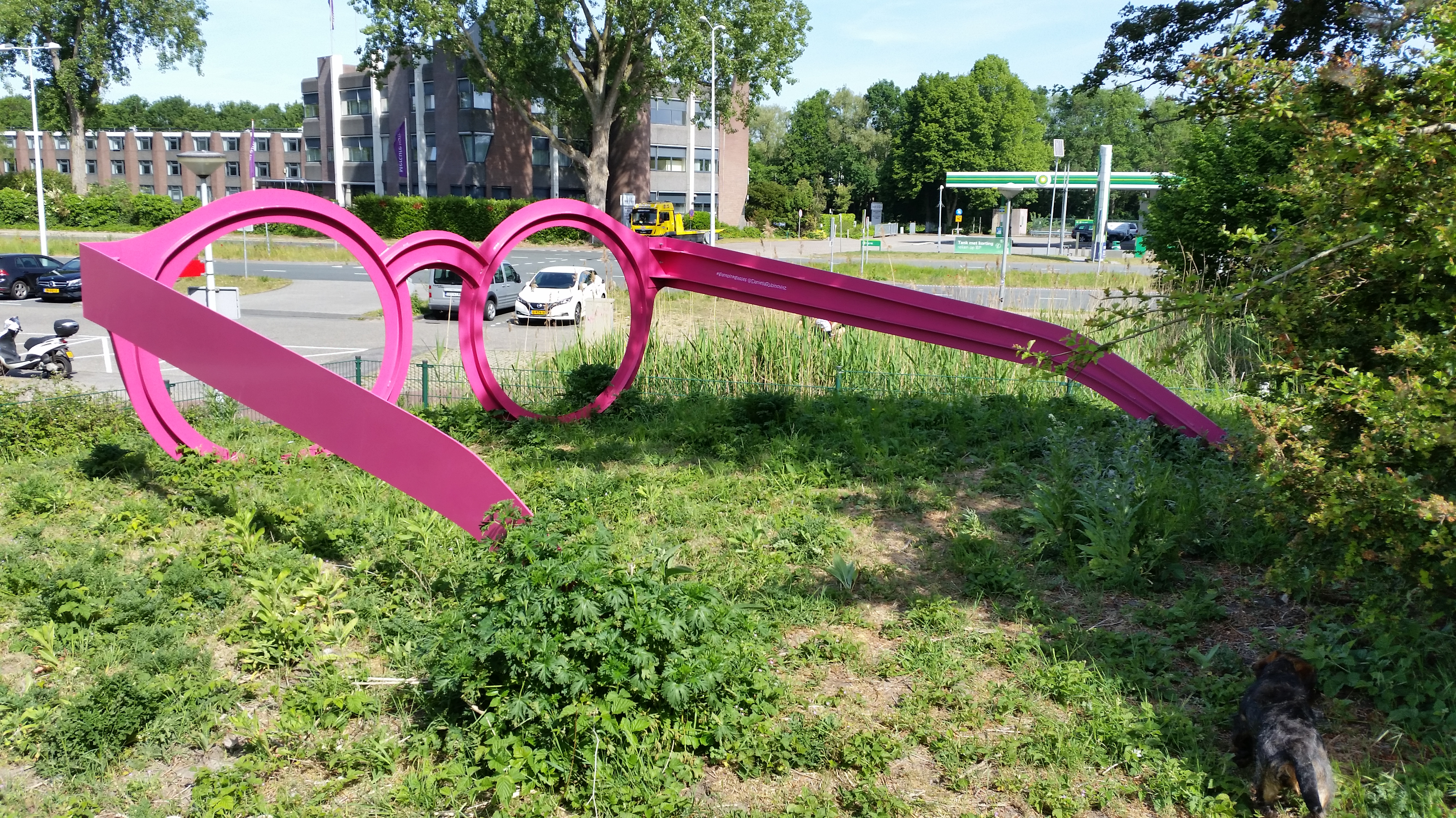 Giant pink glasses van Daniella Rabinovitz langs de Oude Haagse Weg (mei 2020)